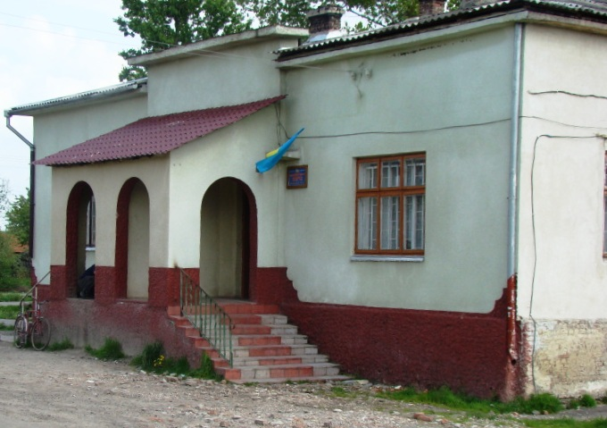 Пикуловичівська Сільська Рада